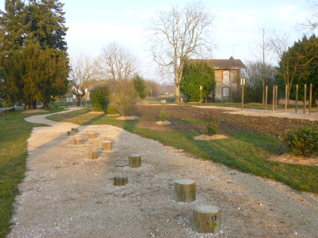 Courtenay, Loiret, France. Parcours de santé près de l'ancienne gare.